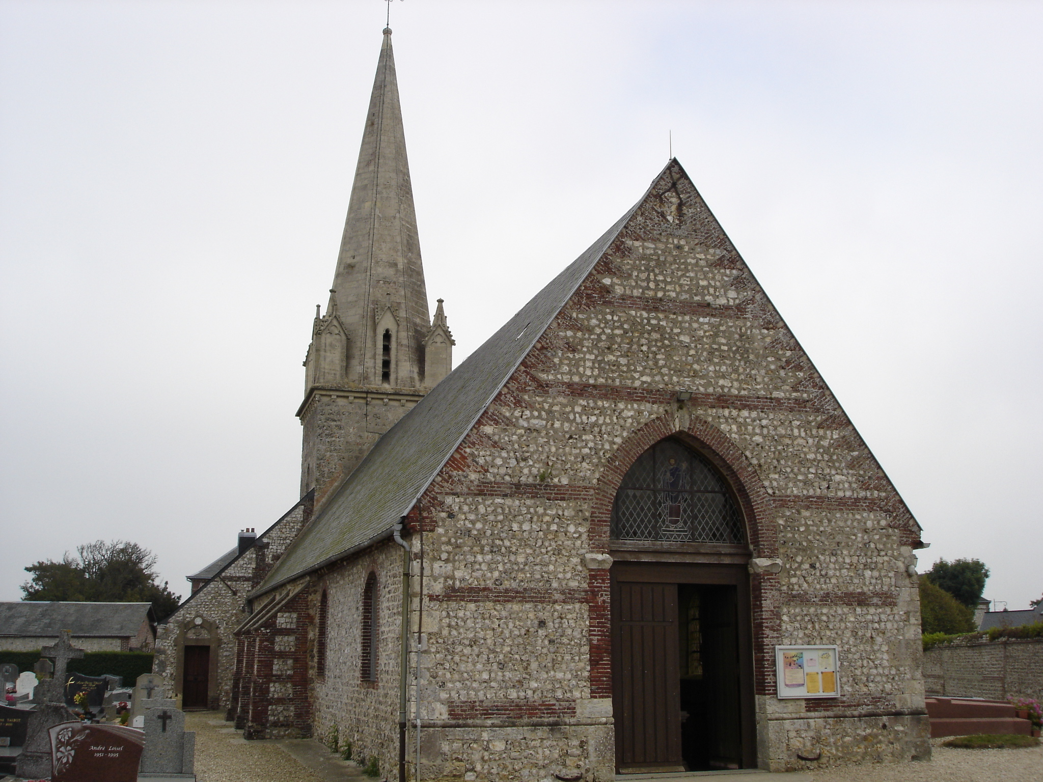 L'église de Vattetot-sur-Mer en 2005 -- Photo amateur prise par moi-même.